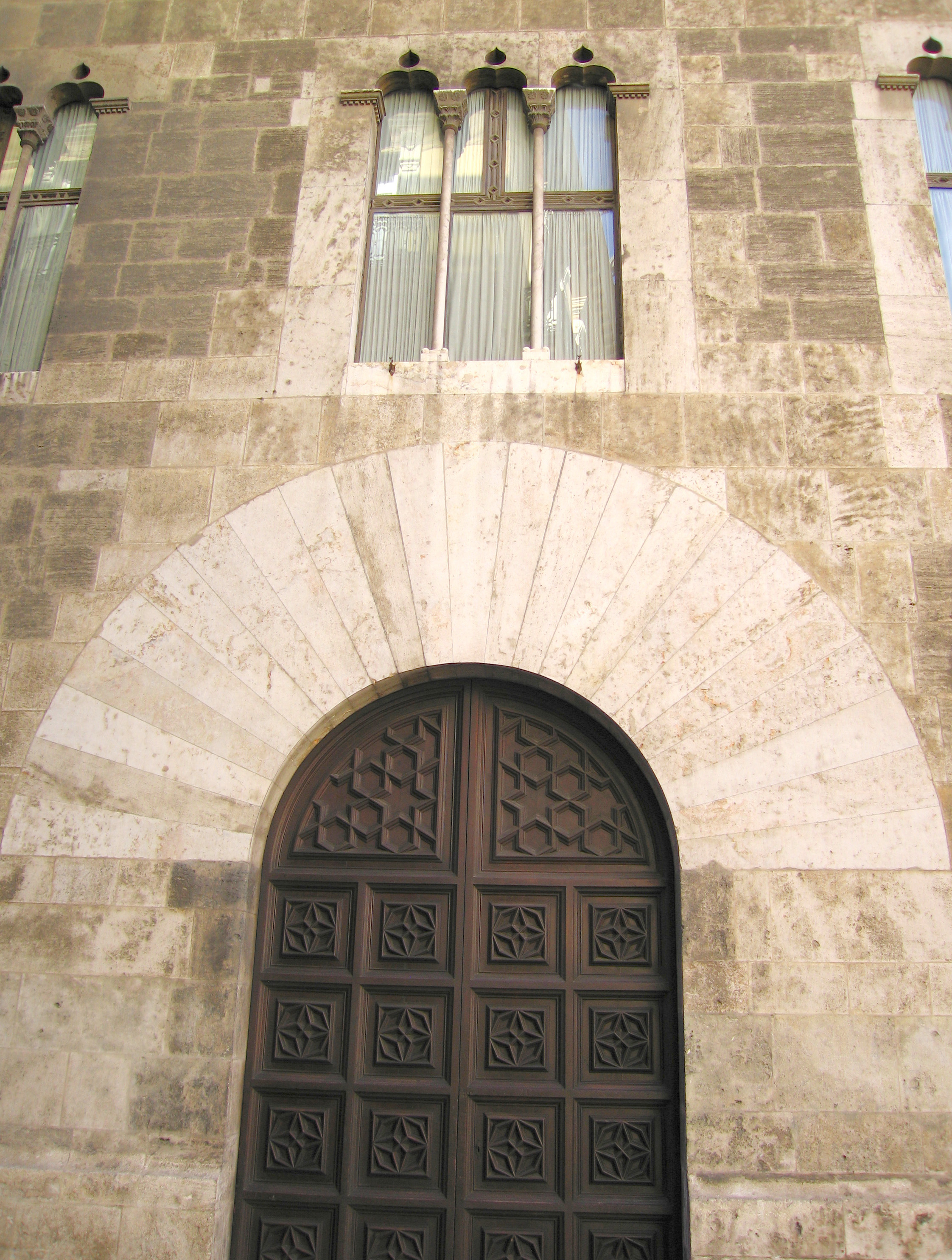 Palau de la Generalitat Valenciana